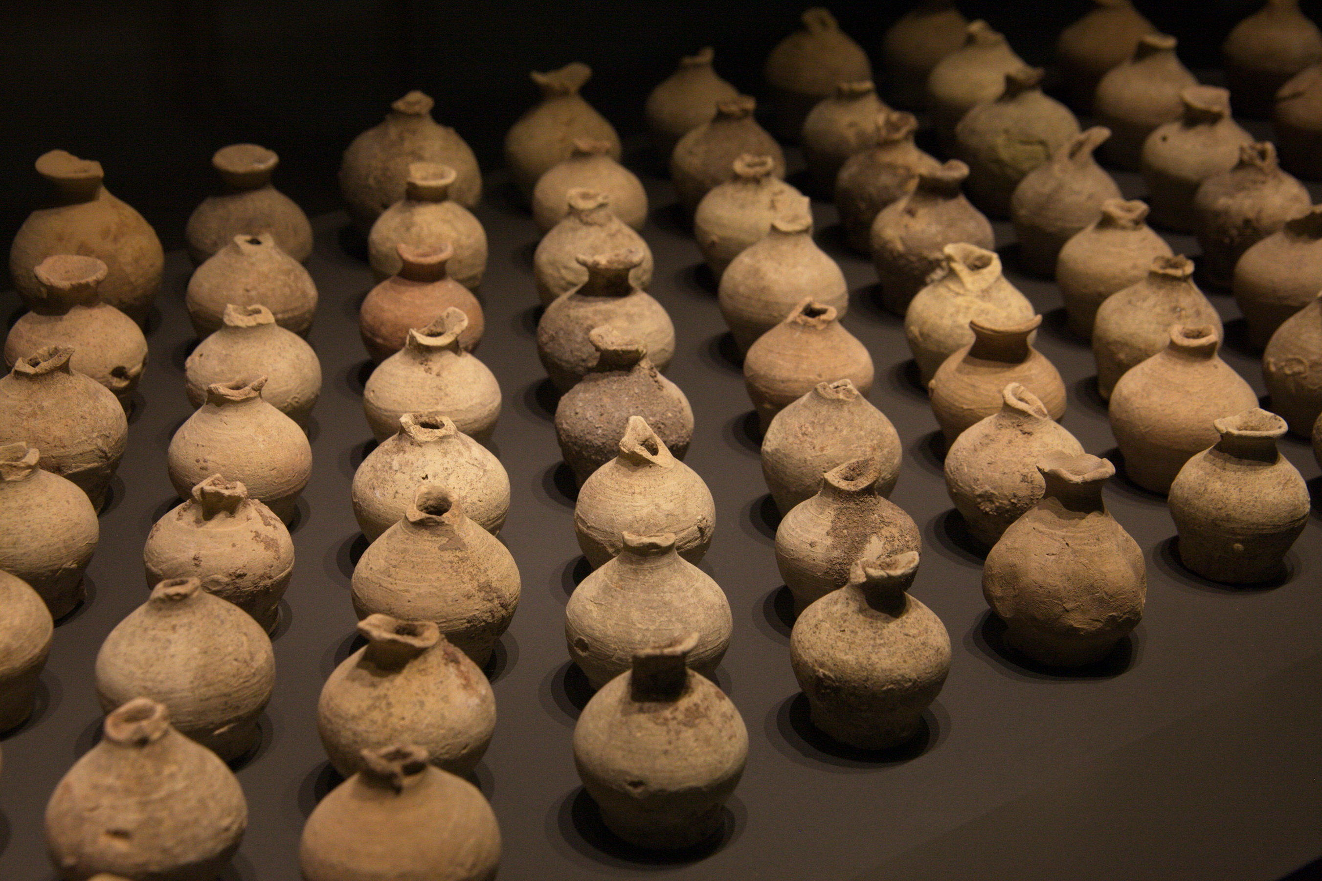 Jaciment arqueològic del Born (Barcelona, 1717). Pots d'adrover